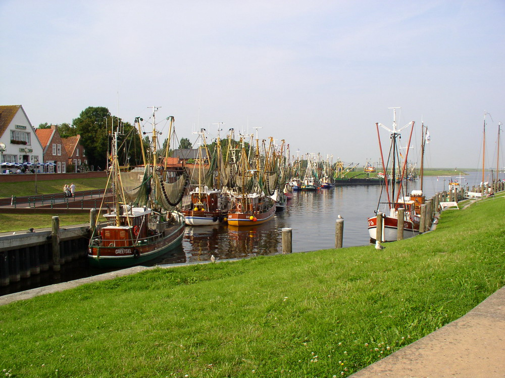 Hafen Greetsiel